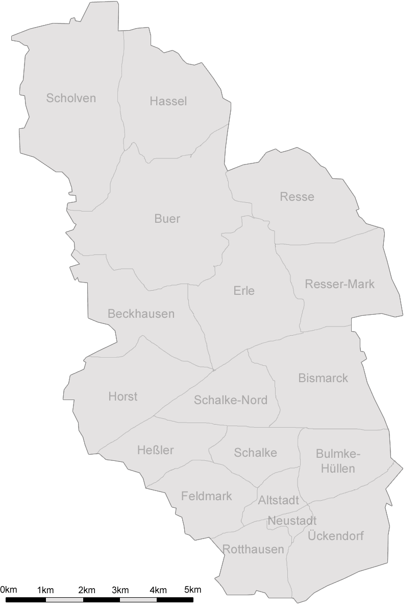 Beschreibung: Selbst erstelle Karte von Gelsenkirchen mit den 18 Stadtteilen. Description: Self-provided map of Gelsenkirchen with its 18 quarters. Quelle/Source: Selbst erstellt / Self-provided Autor/Author: Marc Schuelper